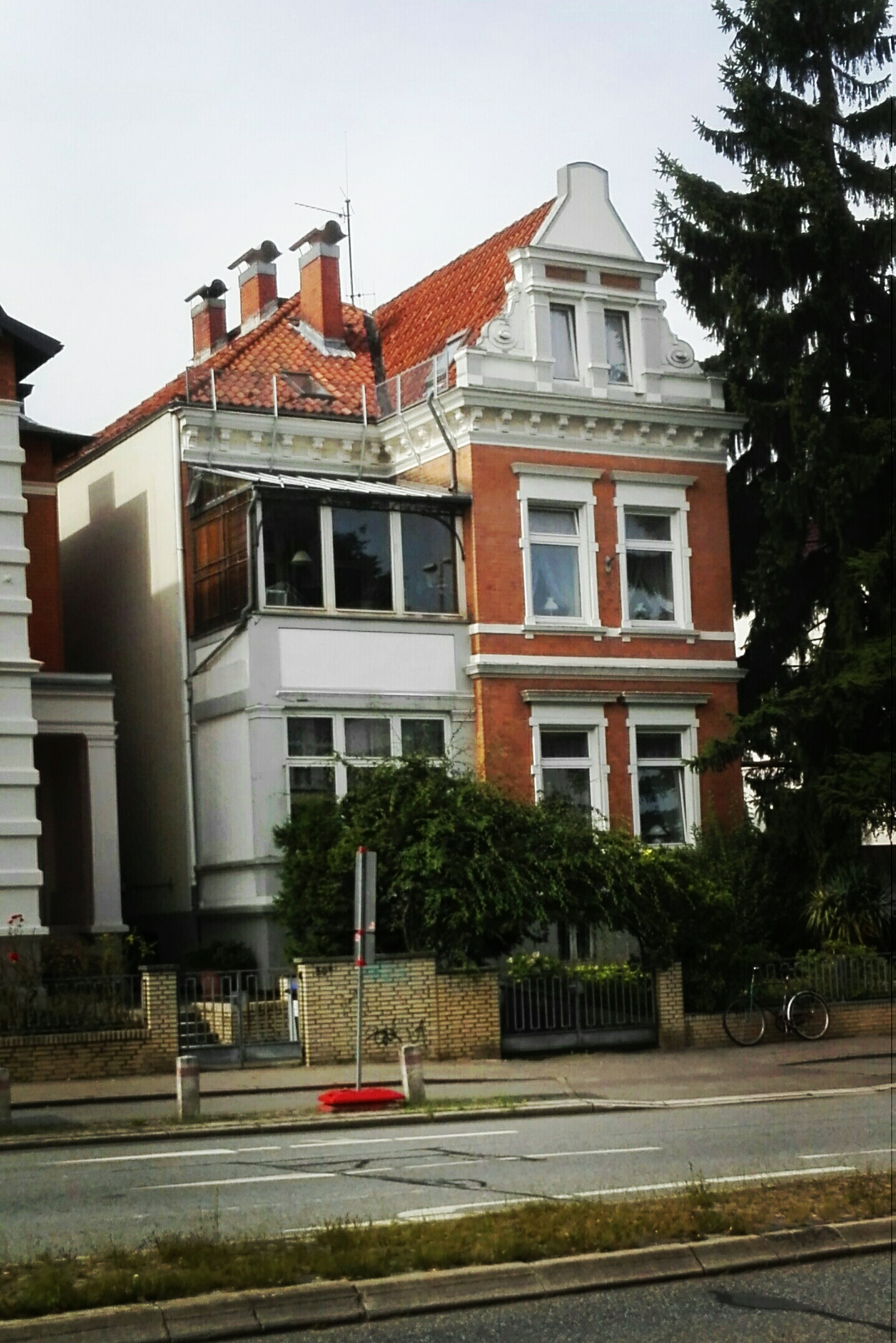 Scherings Haus in der Kronsforder Allee 30. Die Familie bewohnte das Parterre.